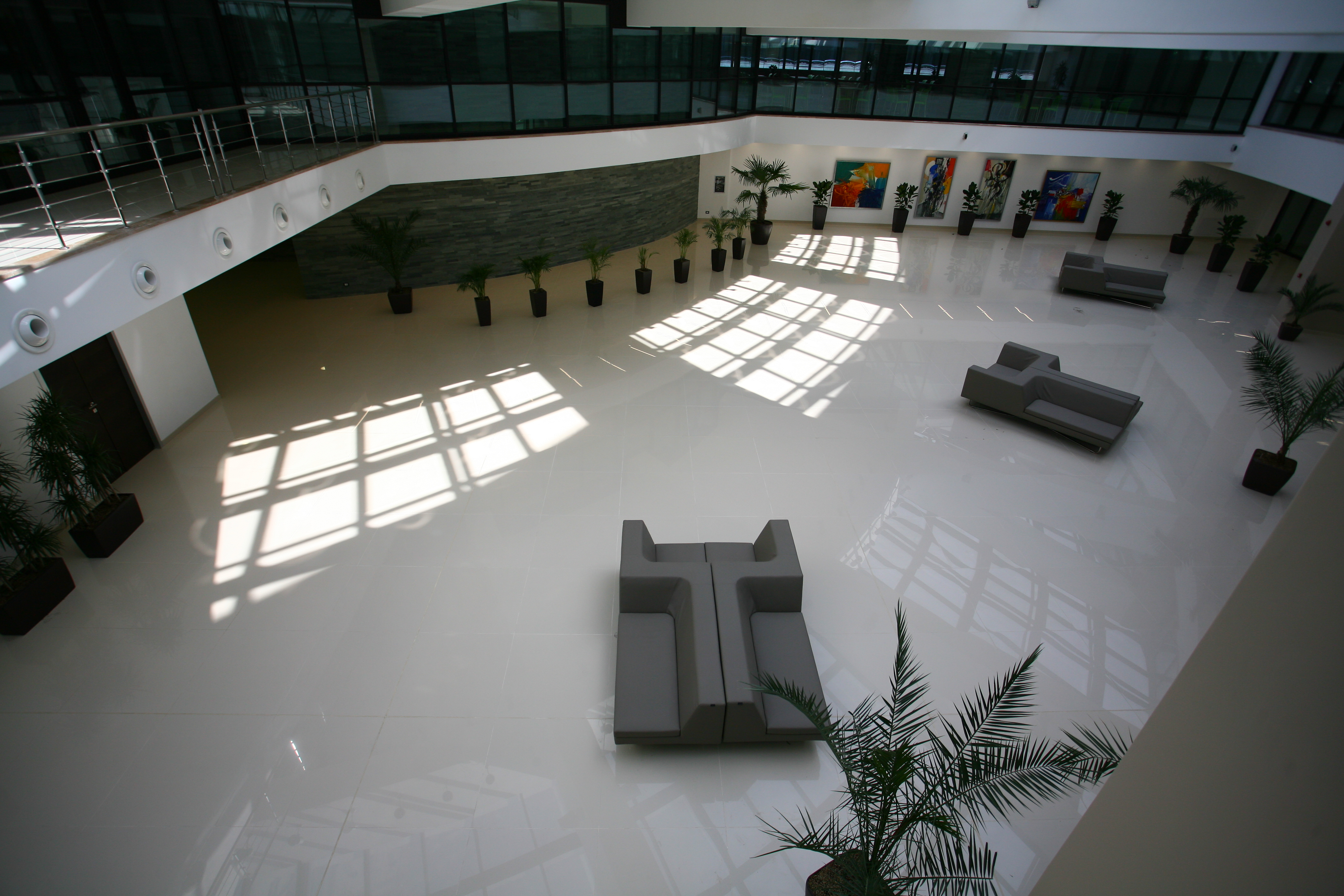 Ձմեռային այգի